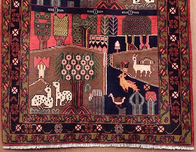 Deze foto van mijn eigen tapijt heb ik zelf gemaakt, u kunt deze foto ook vinden op mijn site ( met een beschrijving van het kleed. Correspondentie over het gebruik van deze foto kunt u voeren via de contactpagina van: Arie M. den Toom Ridderkerk 10 januari 2006